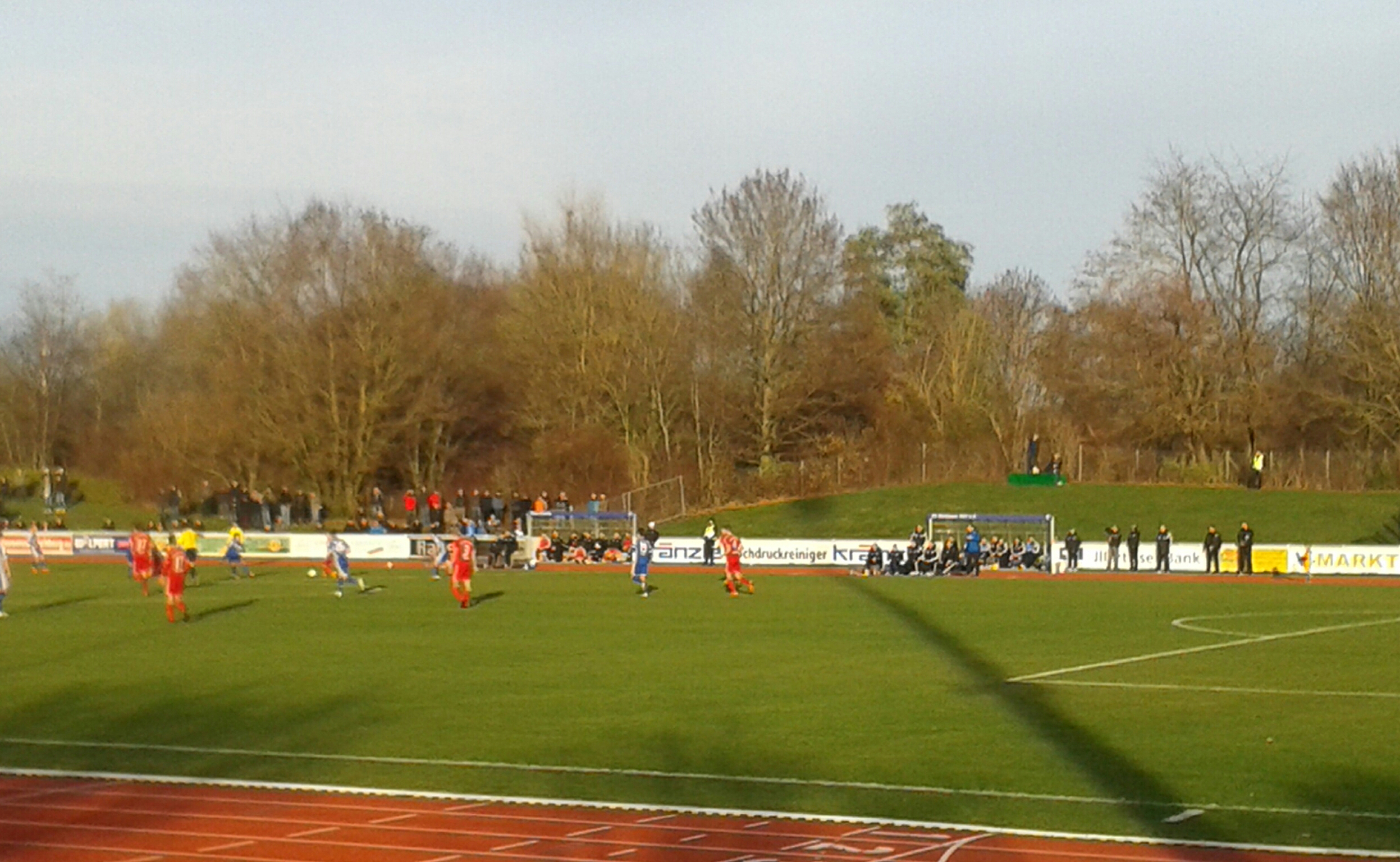 FV Illertissen - FC Memmingen 4-1